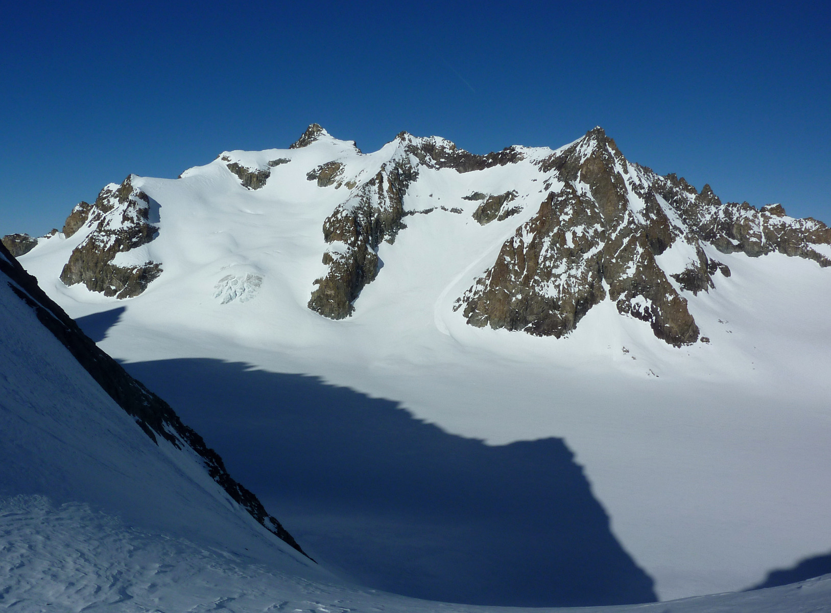 La Roche Faurio (a sinistra) e la Pointe Louise (a destra); in basso il Glacier Blanc - Massiccio des Écrins